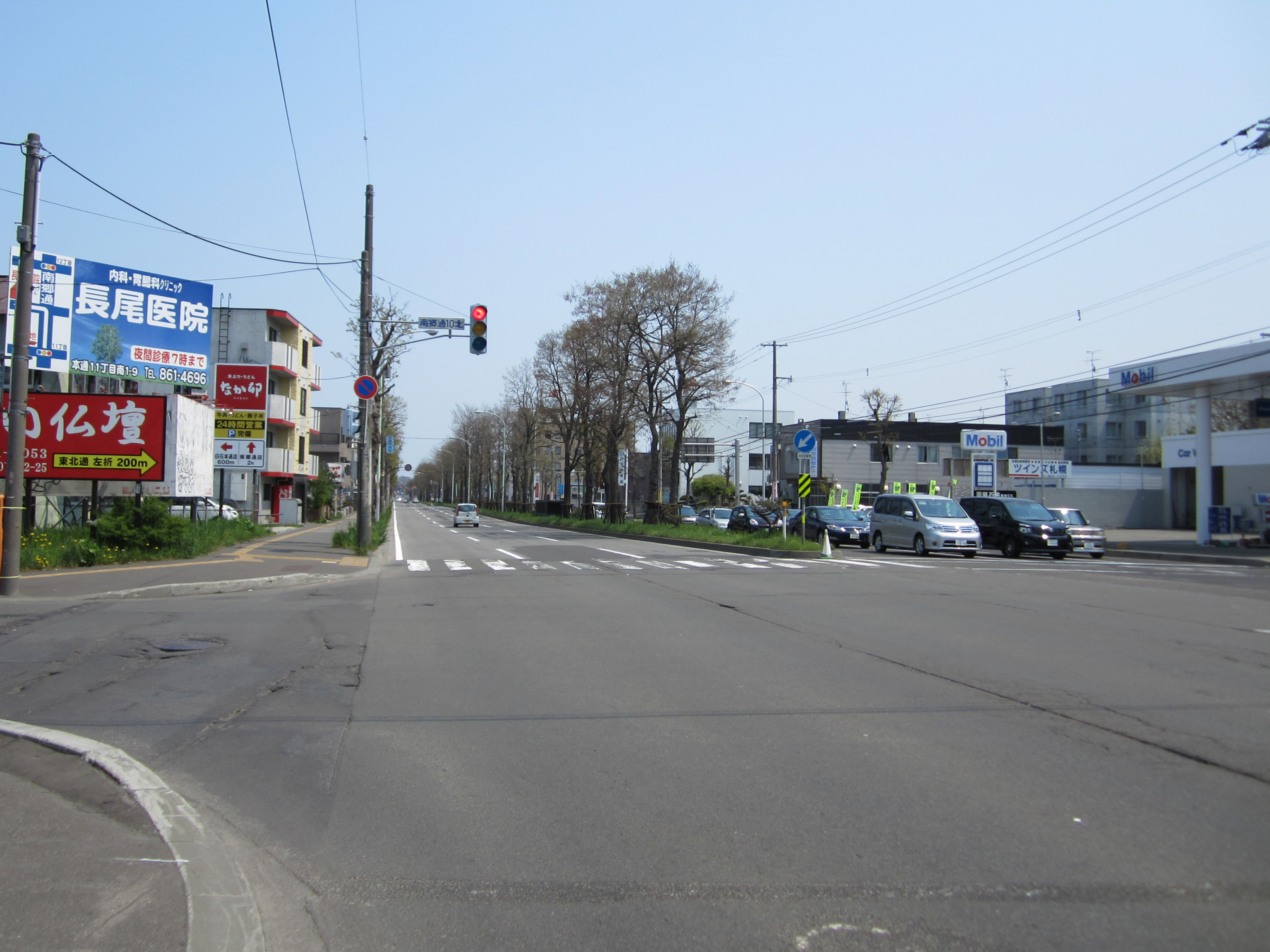 南郷通10丁目の様子（東方向、南郷13丁目駅方面）